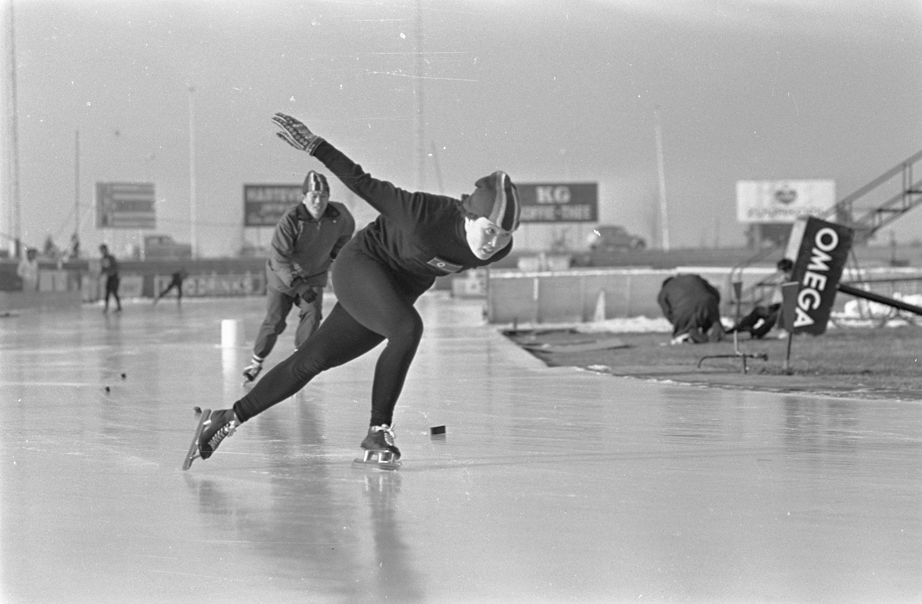 Collectie / Archief : Fotocollectie Anefo Reportage / Serie : [ onbekend ] Beschrijving : WK-schaatsen dames te Deventer, de Noord-Koreaanse Kim Song-Sung in aktie Datum : 14 februari 1967 Locatie : Deventer, Noord-Korea Trefwoorden : schaatsen, sport Persoonsnaam : Kim Song-Sun Fotograaf : Nijs, Jac. de / Anefo Auteursrechthebbende : Nationaal Archief Materiaalsoort : Negatief (zwart/wit) Nummer archiefinventaris : bekijk toegang 2.24.01.05 Bestanddeelnummer : 920-0776